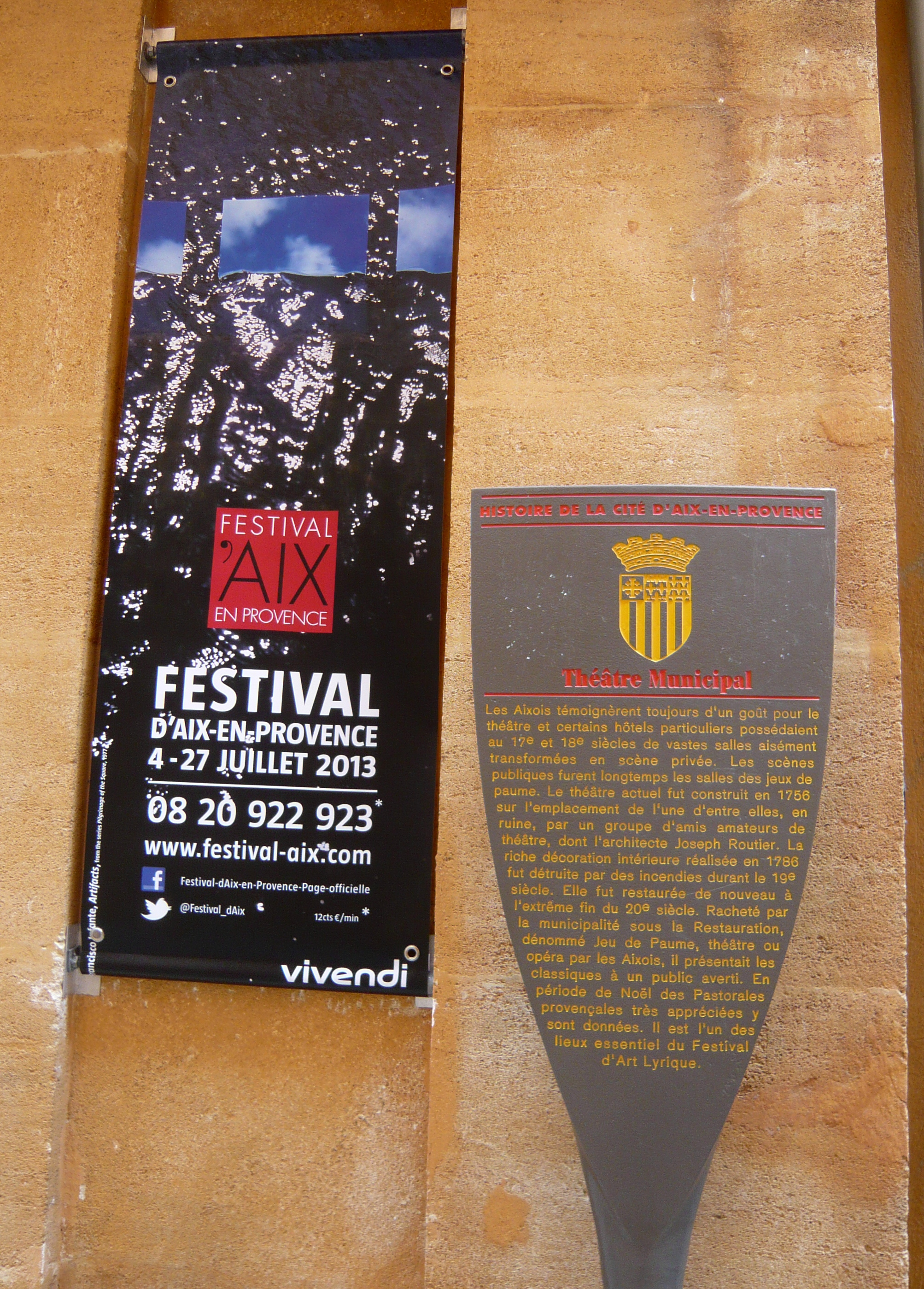 Potelet d'information du "Théâtre Municipal" ou du Jeu de Paume, 17 rue de l'Opéra, Aix-en-Provence (France). Les Aixois témoignèrent toujours d’un goût pour le théâtre et certains hôtels particuliers possédaient au 17e et18e siècles de vastes salles aisément transformées en scène privée. Les scènes publiques furent longtemps les salles des jeux de paume. Le théâtre actuel fut construit en 1756 sur l’emplacement de l’une d’entre elles, en ruine, par un groupe d’amis amateurs de théâtre, dont l’architecte Joseph Routier. La riche décoration intérieure réalisée en 1786 fut détruite par des incendies durant le 19e siècle. Elle fut restaurée de nouveau à l’extrême fin du 20e siècle. Racheté par la municipalité sous la Restauration, dénommé Jeu de Paume, théâtre ou opéra par les Aixois, il présentait les classiques à un public averti. En période de Noël des Pastorales provençales très appréciées y sont données. Il est l’un des lieux essentiel du Festival d’Art Lyrique.